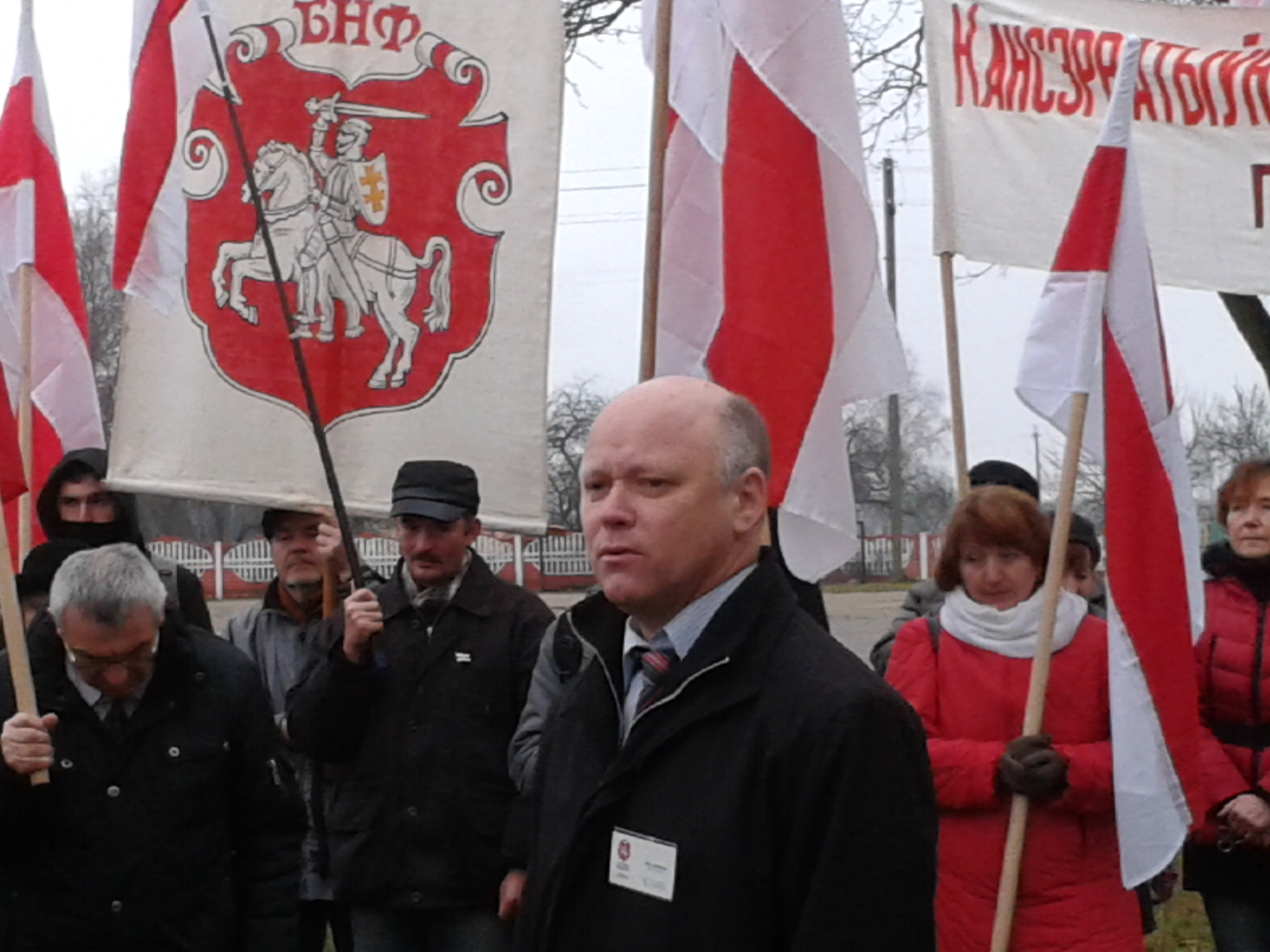 Беларуская (тарашкевіца): Выступ Юрася Беленькага ў мястэчку Грозава 24 лістапада 2013 году пад час ушанаваньня памяці слуцкіх ваяроў 1920 году.